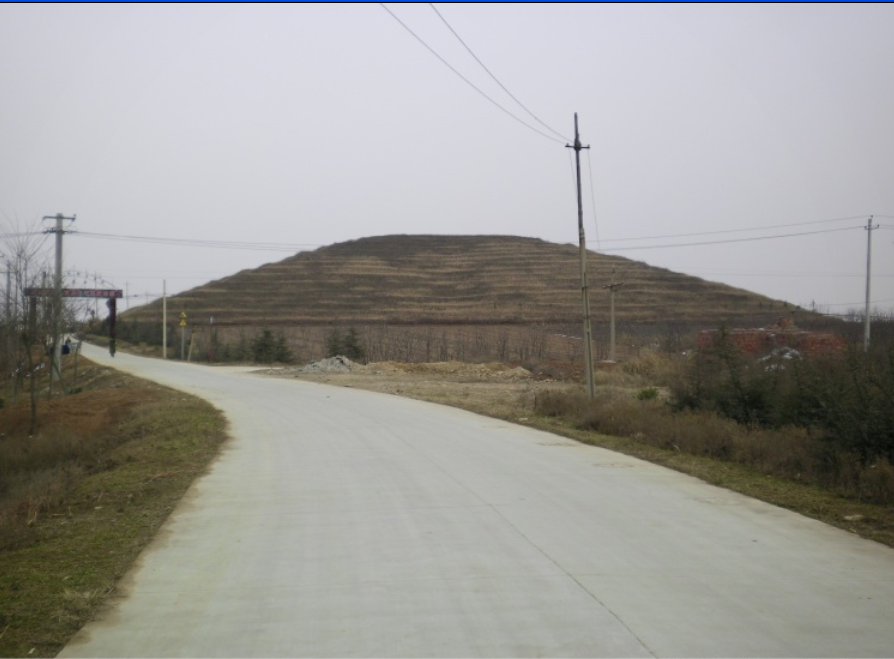 位于汉文帝霸陵范围之内，今天西安的白鹿原上